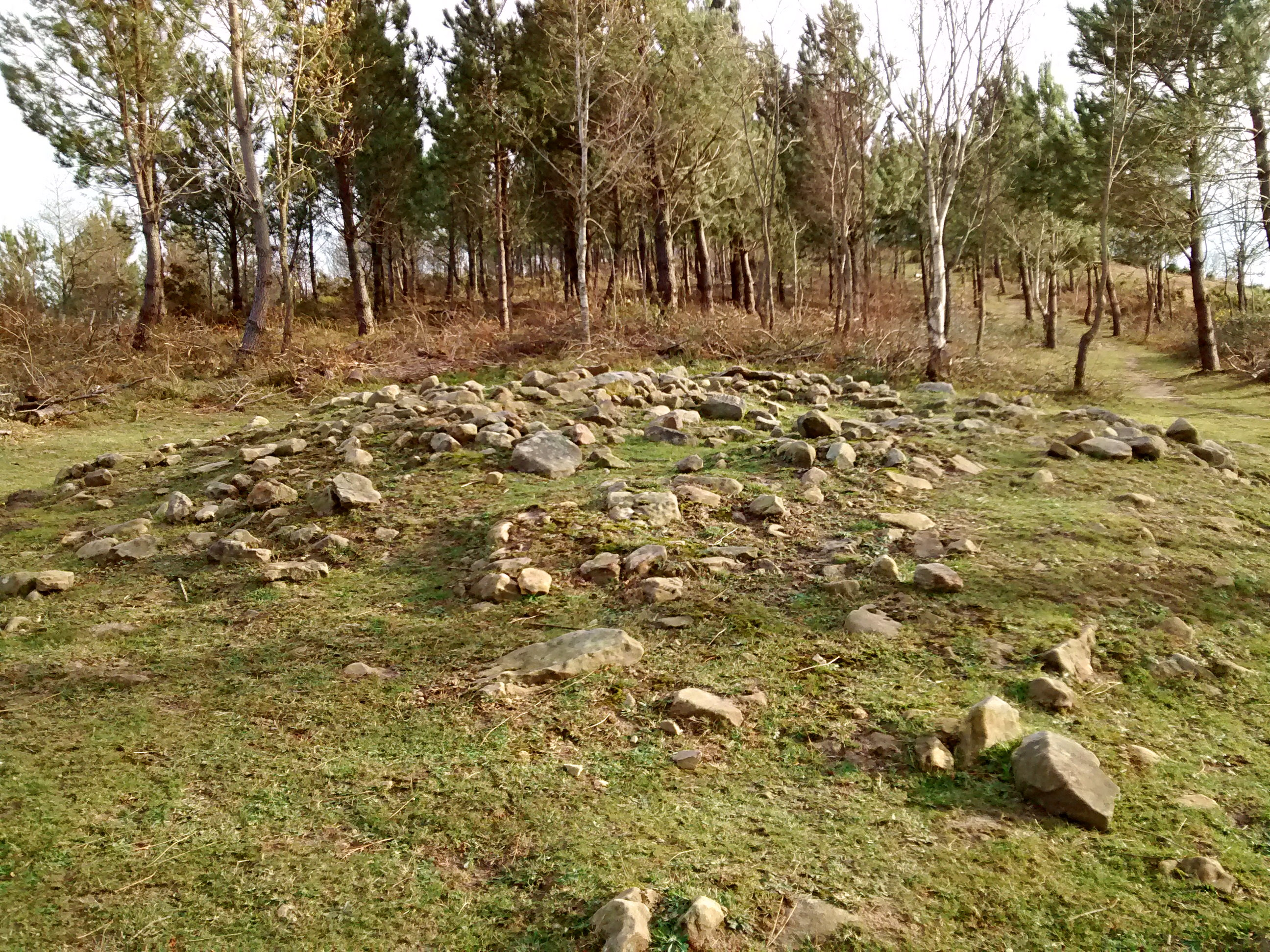 Tontortxiki II tumulua